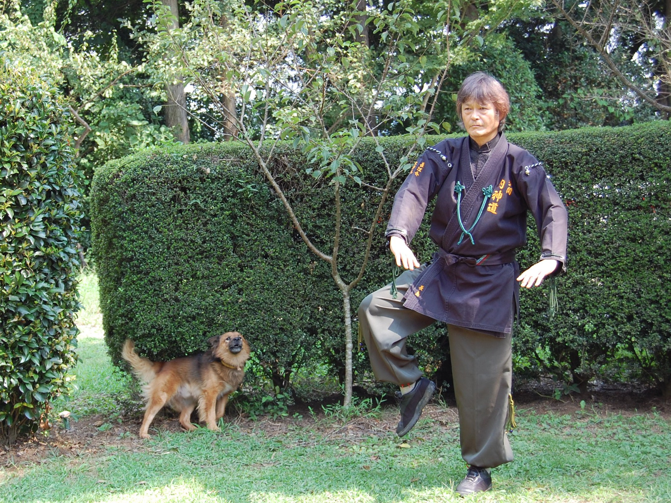 内神道「上架提腿」技稽古